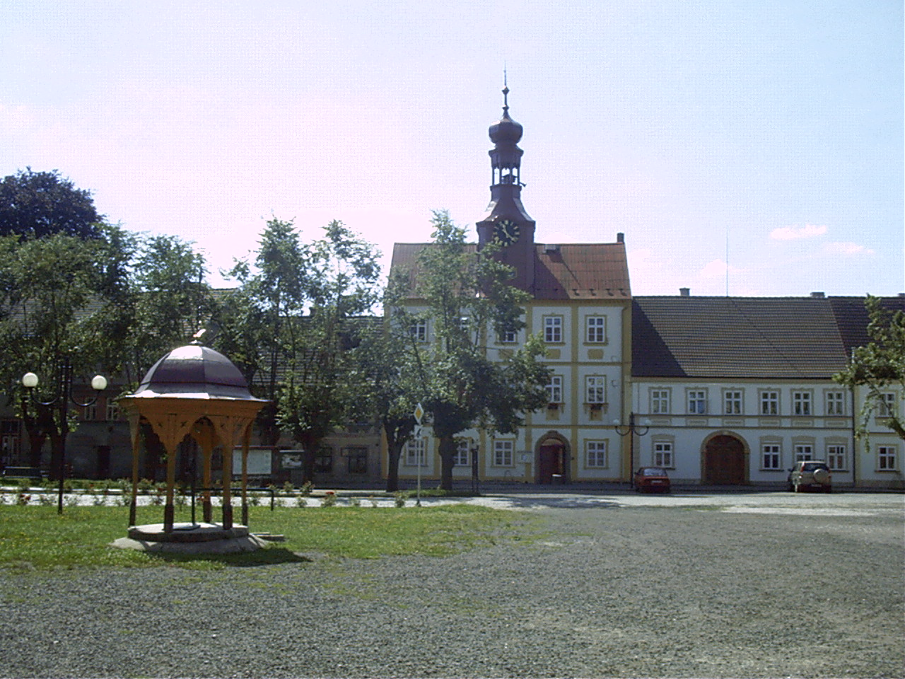 Městský úřad v Železnici